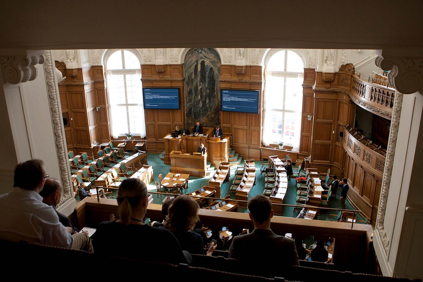 Grænsehindringsdebat i Folketinget.